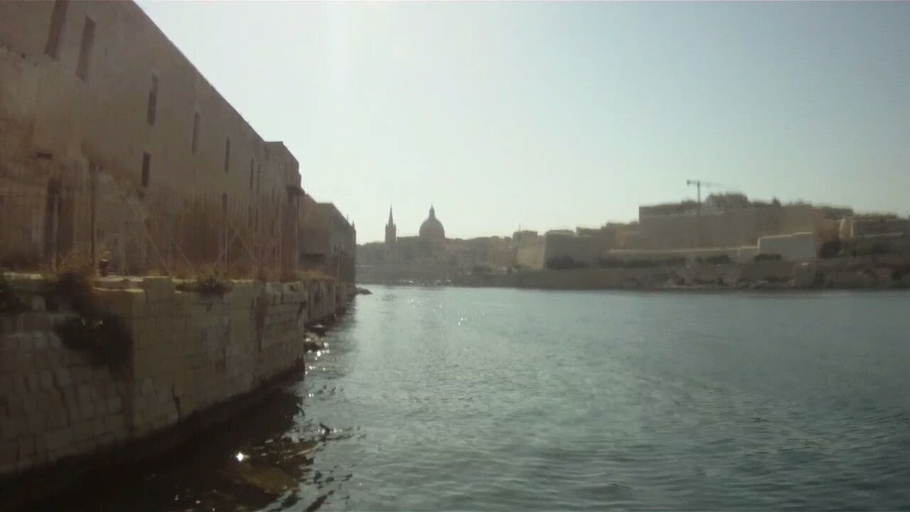 X127 Carolita